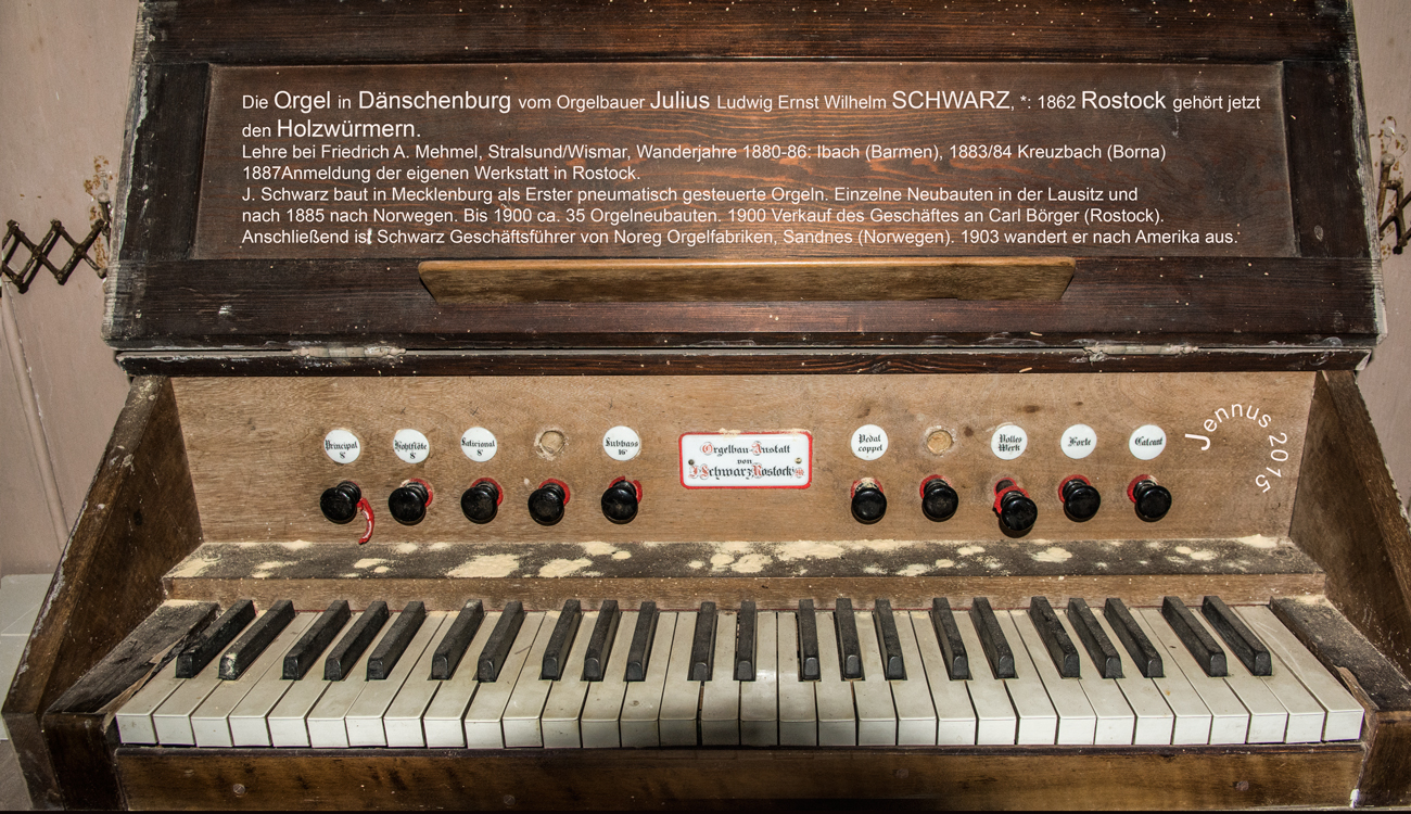 Spieltisch der Orgel in der Dorfkirche zu Dänschenburg bei Rostock. Orgelbauer Julius Schwarz